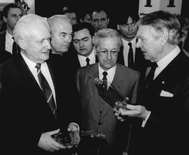 ADN-ZB 1.4.1987 BRD: Mittag Besuch Günter Mittag, (l.) Mitglied des Politbüros und Sekretär des ZK der SED, Stellvertreter des Vorsitzenden des Staatsrates der DDR, besuchte auf der Hannover-Messe den Pavillon der Friedr. Krupp GmbH. Der Vorsitzende des Aufsichtsrates, Dr. hc.. Berthold Beitz (r.) informierte die Gäste über maschinell gefertigte Kunststofflaschen. M.: Gerhart Beil, DDR-Ausenhandelsminister, 2.v.l.: Botschafter Ewald Moldt, Leiter der Ständigen Vertretung der DDR in der BRD.